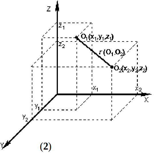 Կլաստերային տարրերի Էվկլիդեսային հեռավորություններ